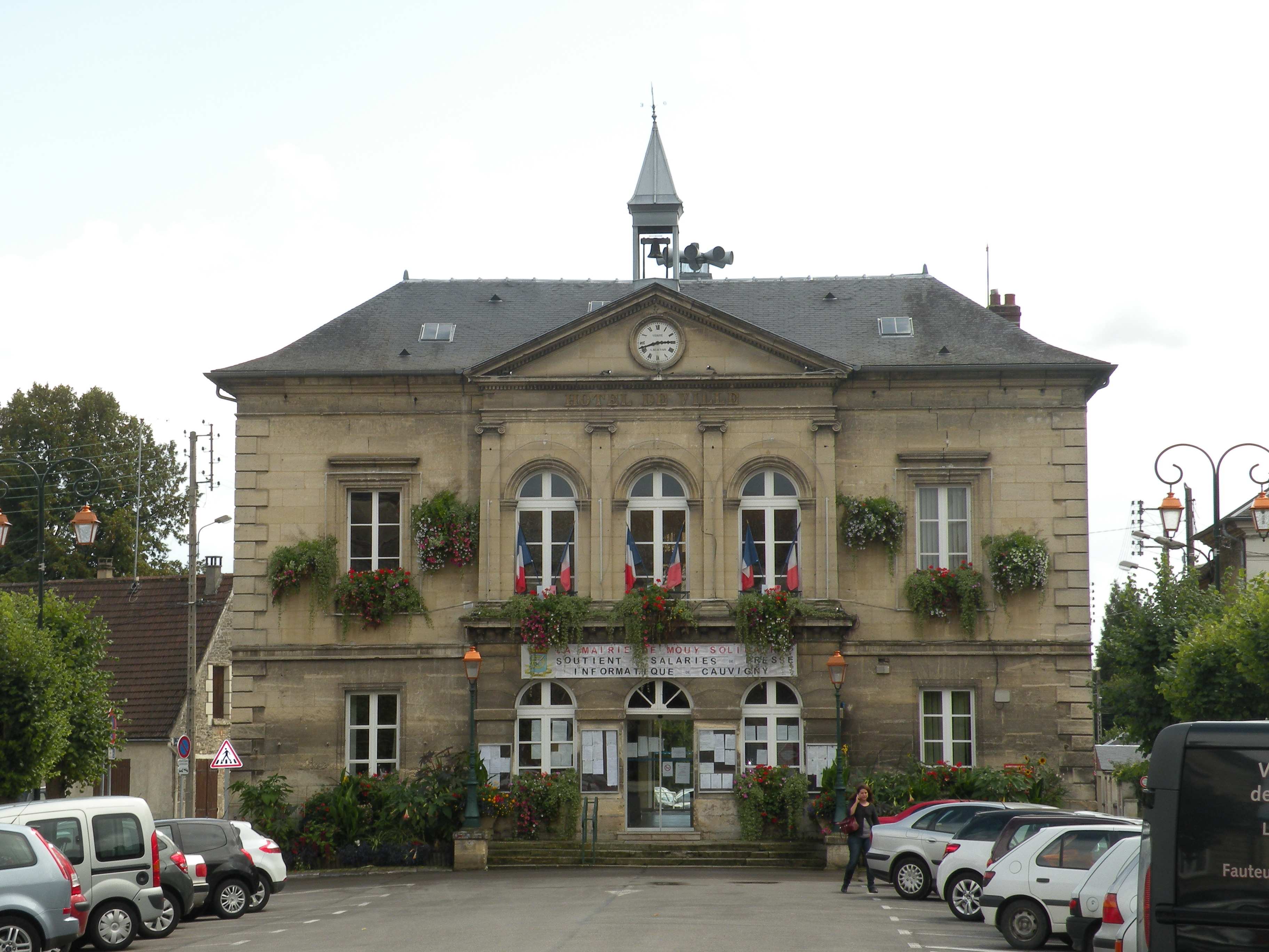 mairie de mouy